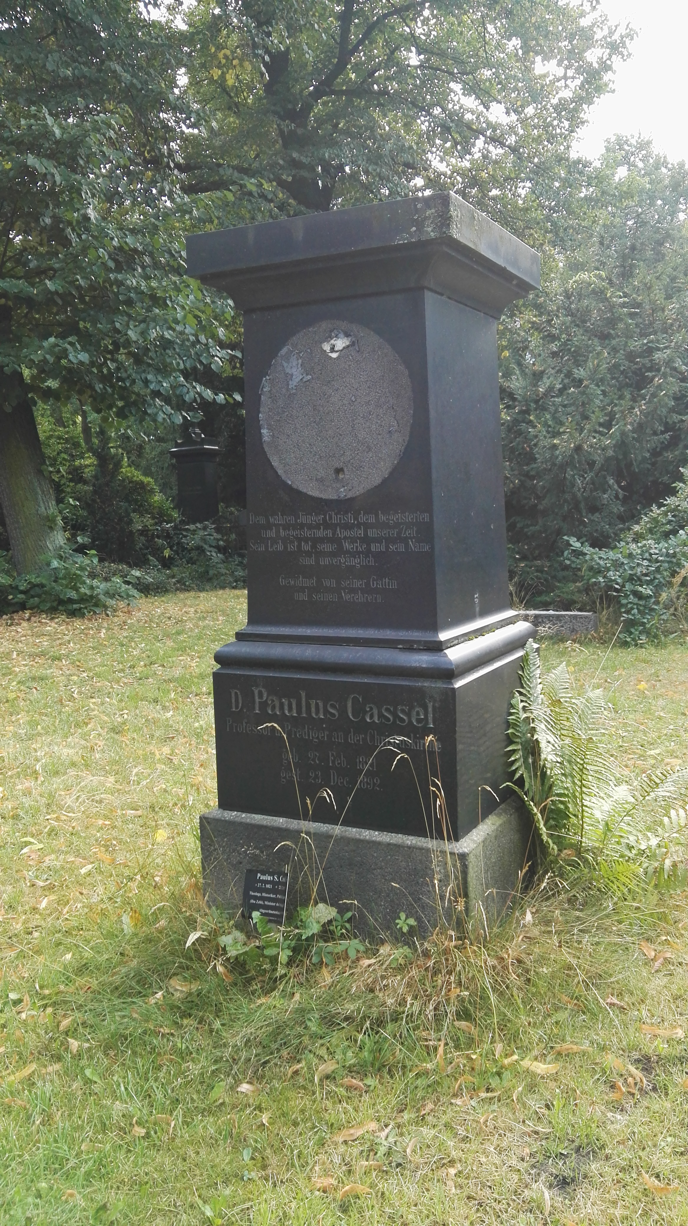 Grab von Paulus Stephanus Cassel auf dem Friedhof I der Jerusalems- und Neuen Kirchengemeinde (Friedhöfe vor dem Halleschen Tor)